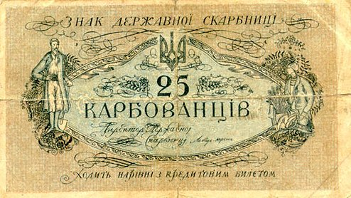 25 karbovanets